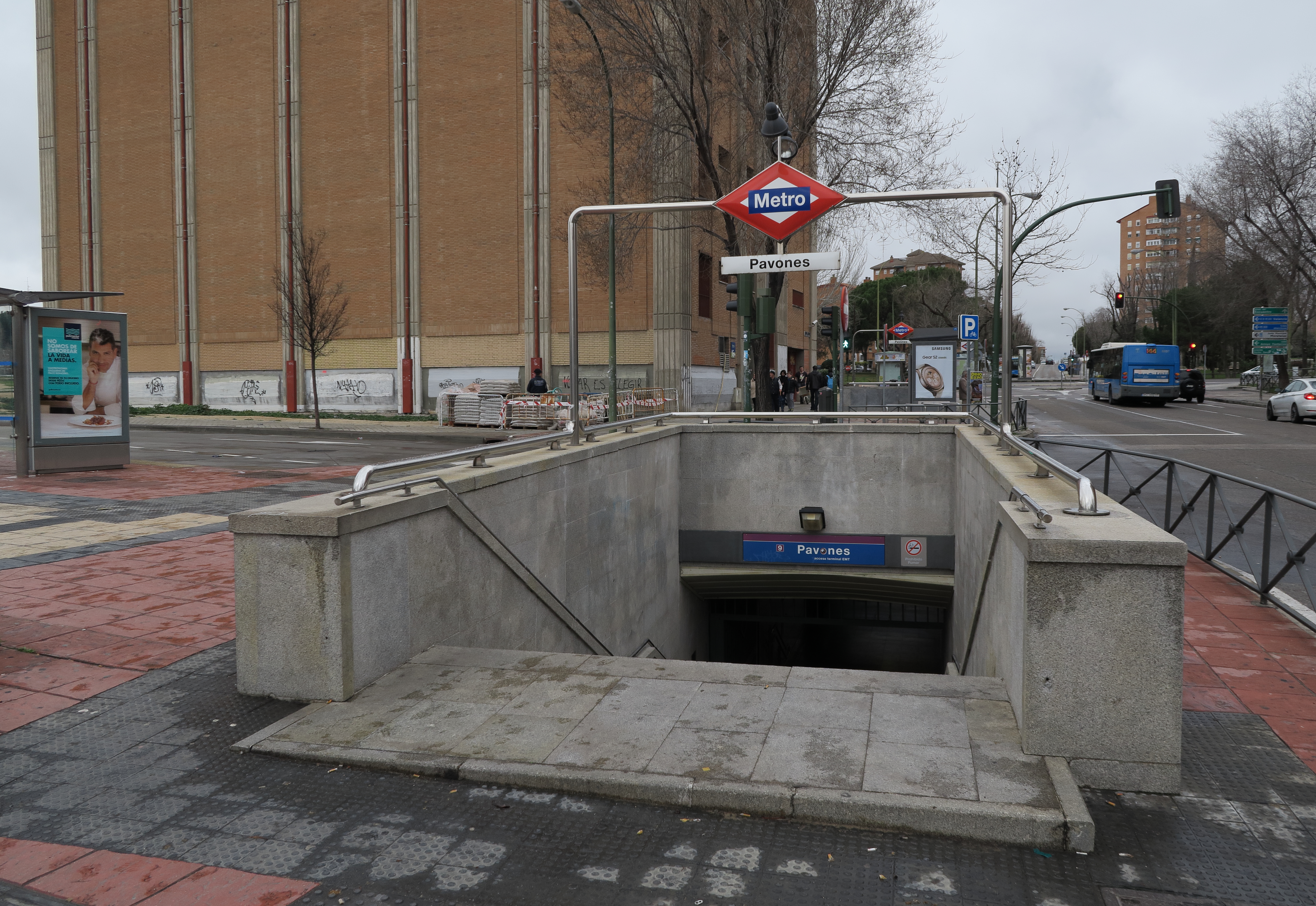 Estación de Pavones